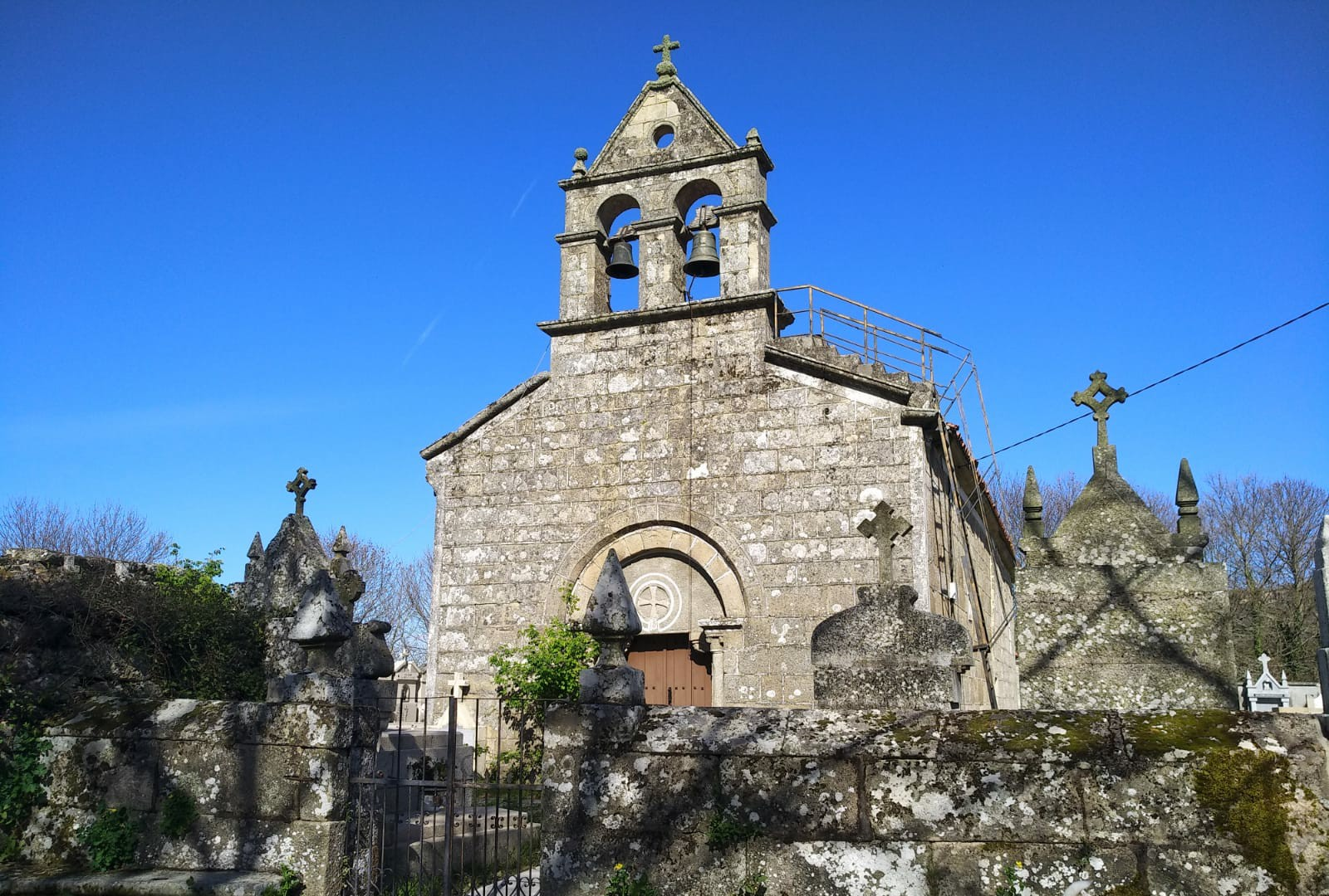 Igrexa de San Xoán de Guntimil